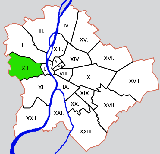 Budapest kerületei: XII. kerület